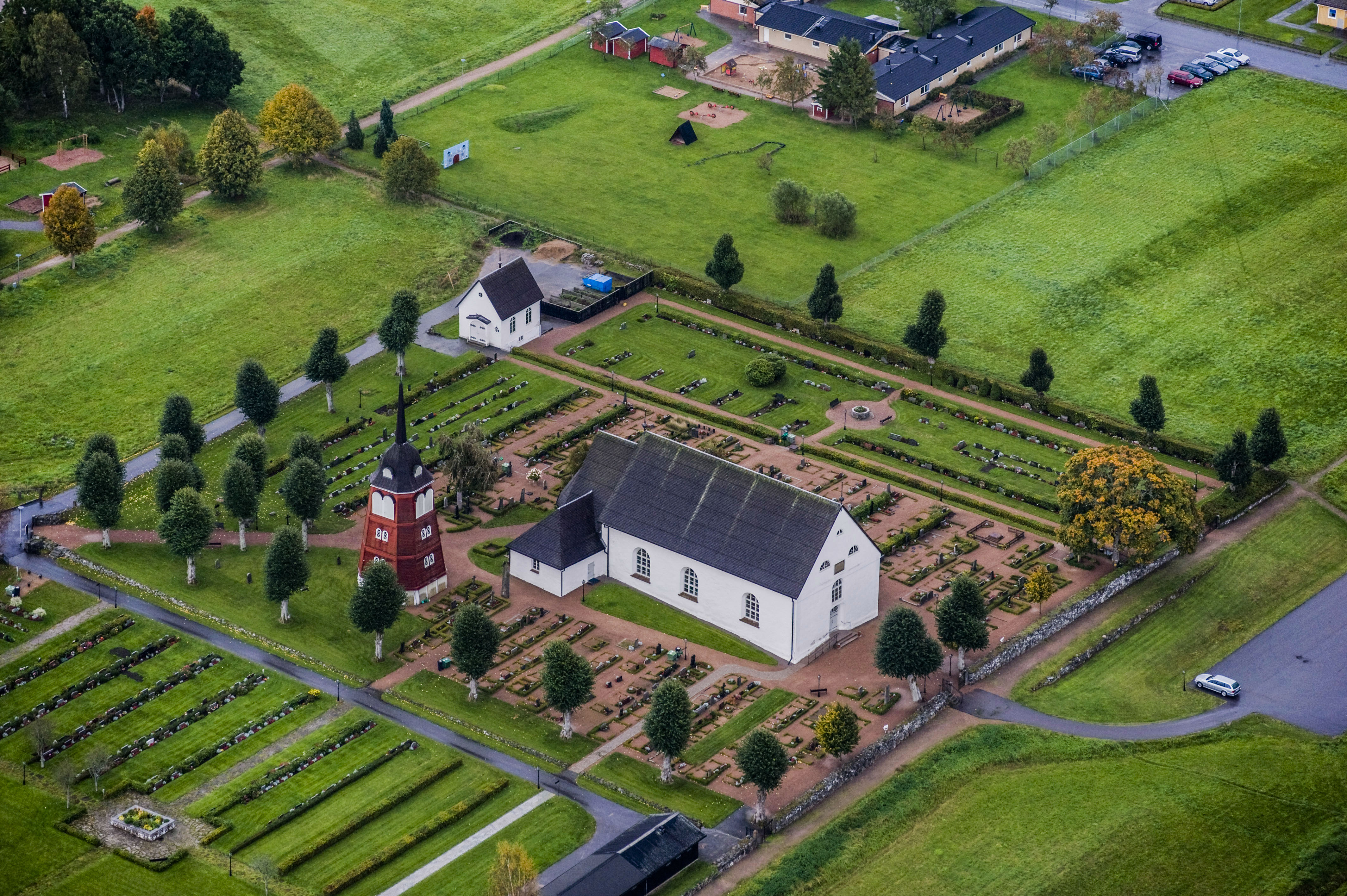 Frilevstads kyrka från luften